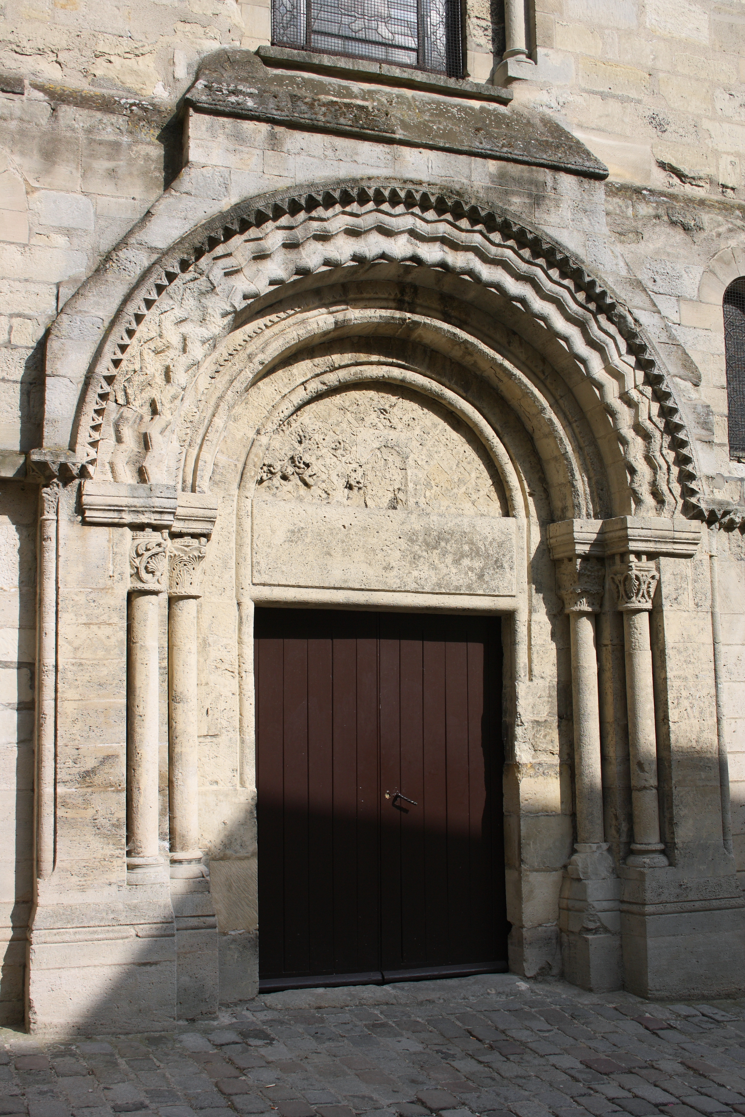 katholische Pfarrkirche Saint-Justin in Louvres, Portal